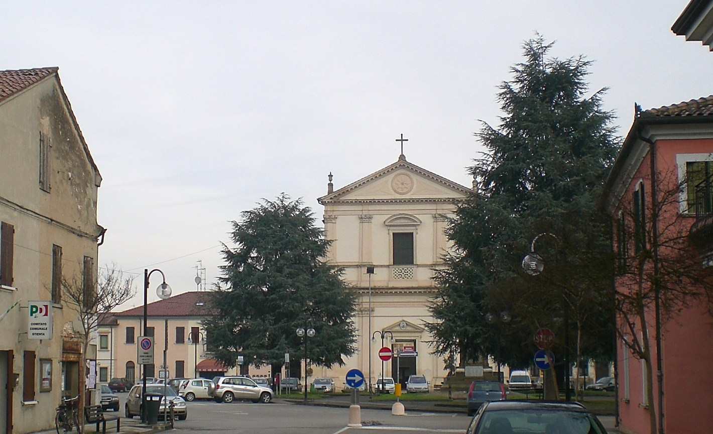 Parrocchia di S. Stefano a Stienta (Rovigo)